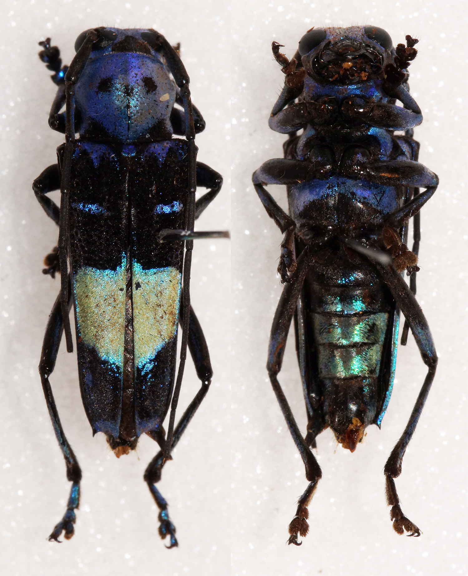 Pic,1926 Sex: ? Data: 05-2014 - Wiang Pa Pao - Thailand Size: 15mm